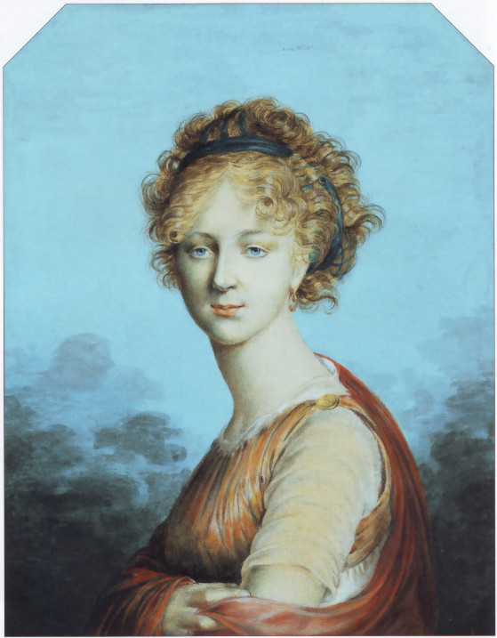 Мария Алексеевна Свистунова, урождённая Ржевская. Жена Николая Петровича Свистунова (1770-1815)